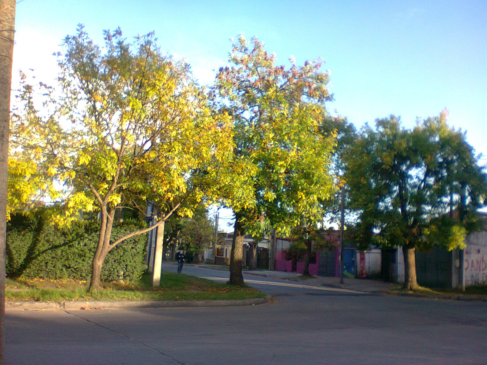 Típica esquina del Barrio